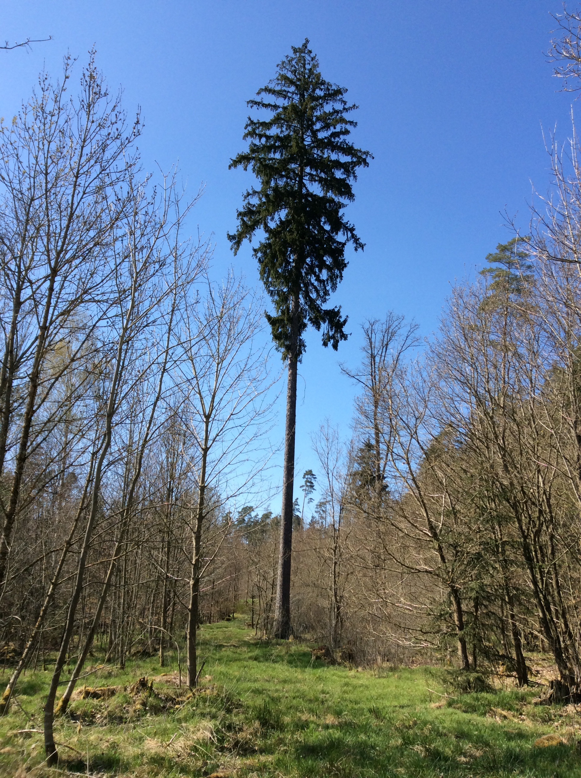 Ein einsamer Riese (Fichte?) im Mönchswald, Landkreis Weißenburg-Gunzenhausen, Mittelfranken, Bayern. – Abgebildeter Bereich eventuell im FFH-Gebiet DE-6830-371 gelegen?